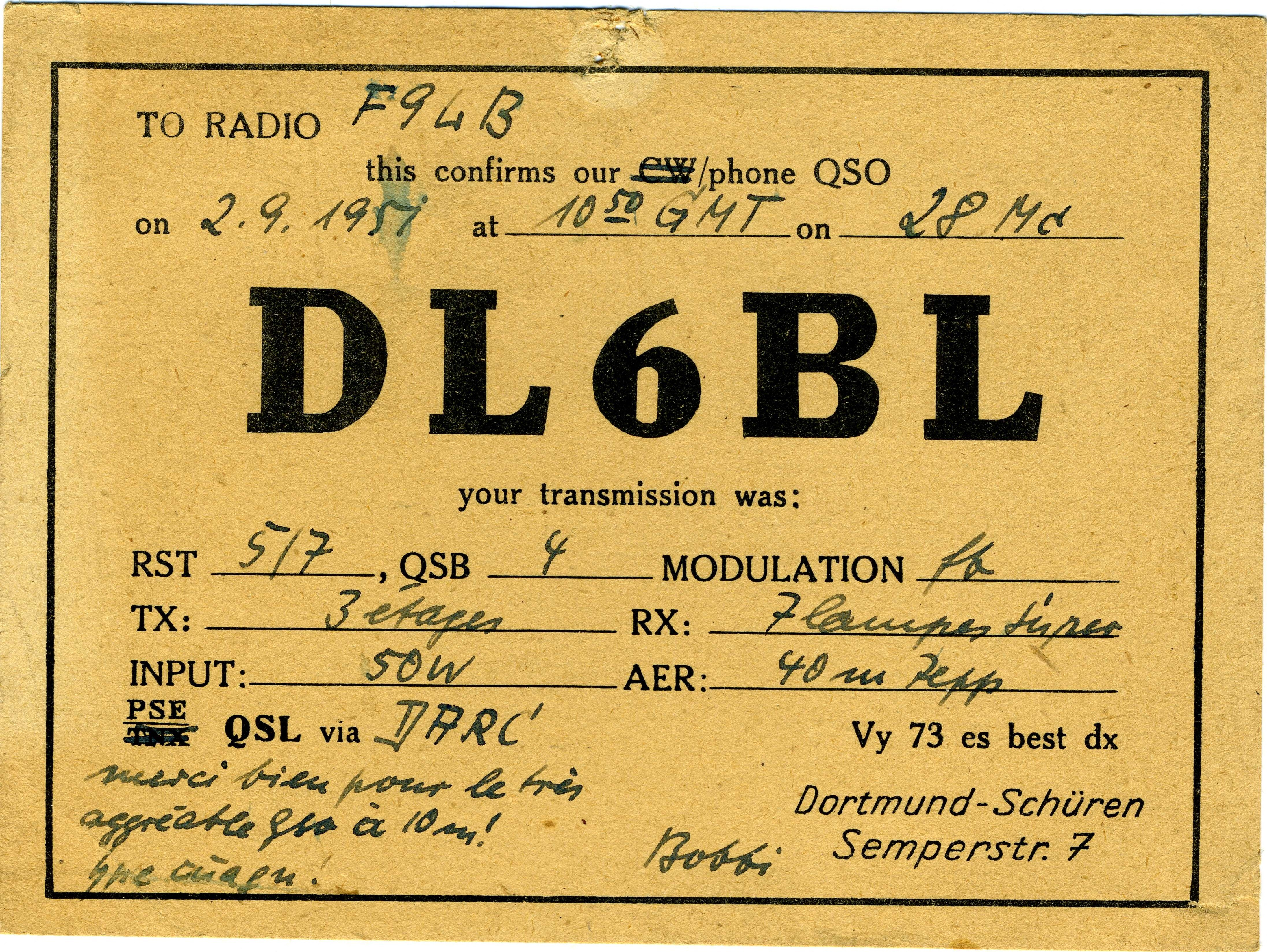 QSL-Karte von DL6BL an F9LB, September 1951.